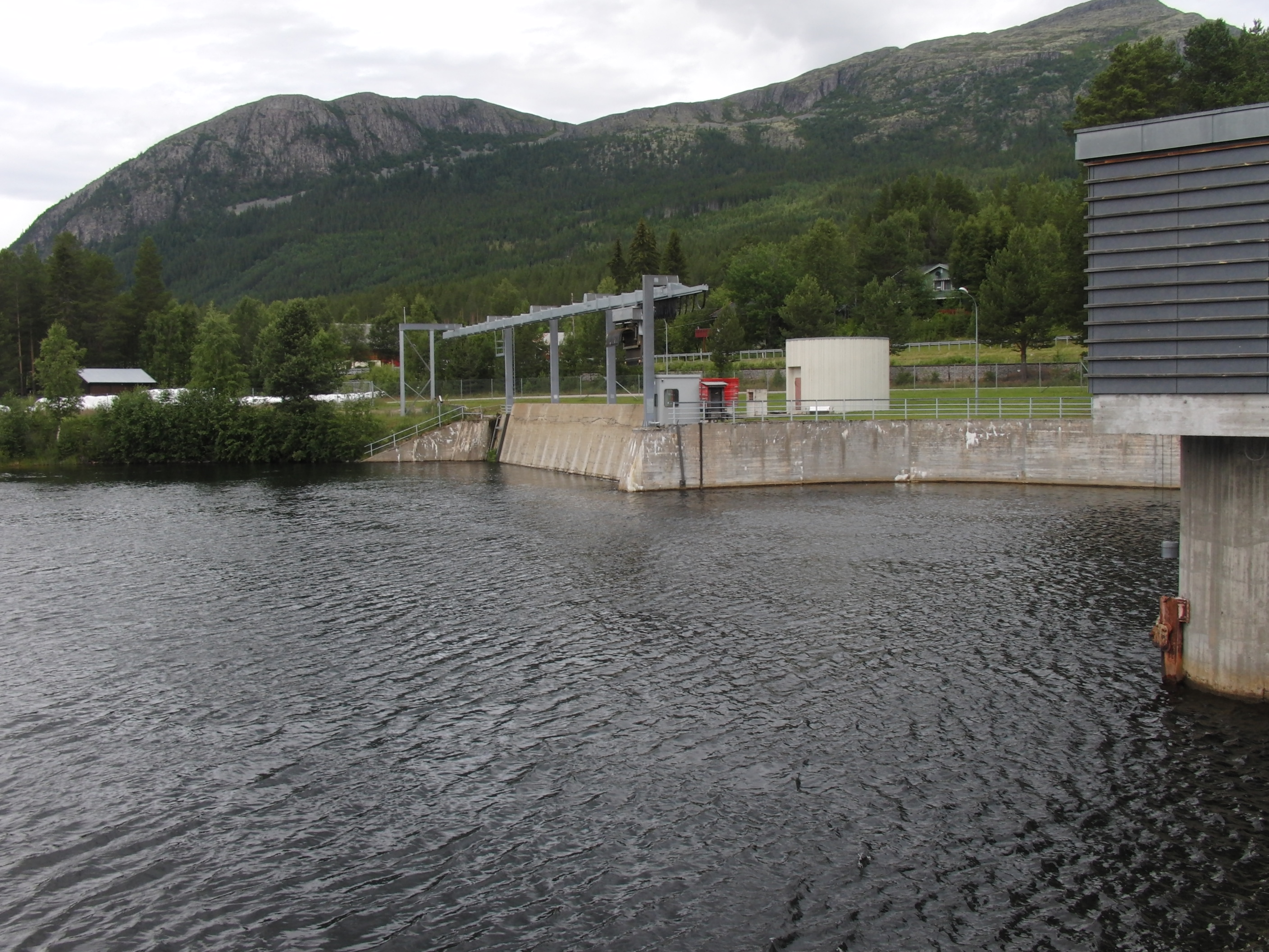 Høyeggdammen. Inntak til Rendalen kraftverk